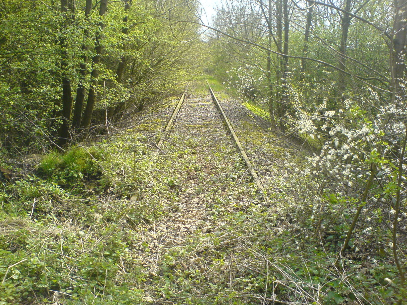 Die zugewachsene Eisenbahnstrecke bei Sonneborn (in Lippe)